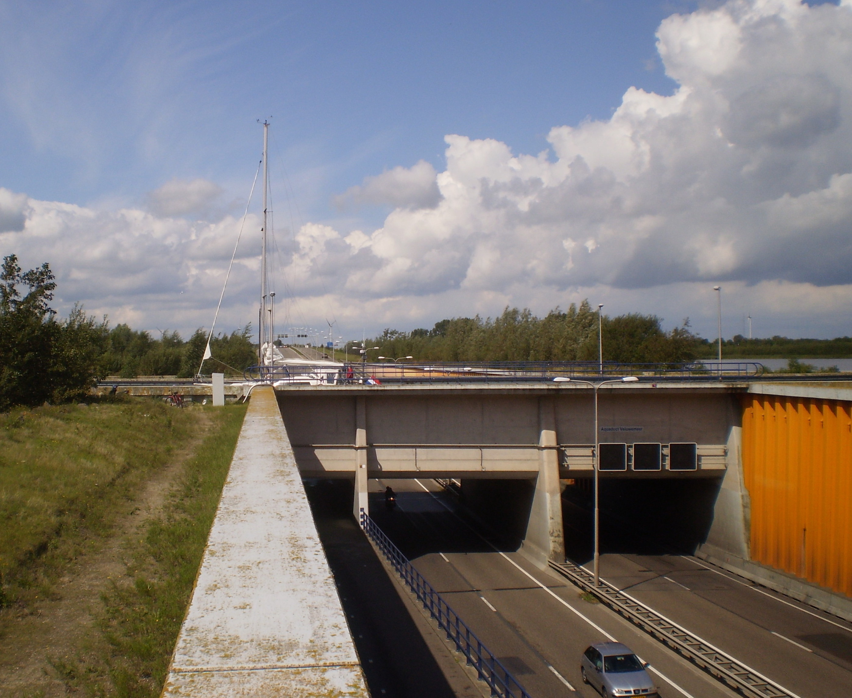 Aquaduct Veluwemeer tussen Harderwijk en Flevoland, verbindt het Veluwemeer met het Wolderwijd